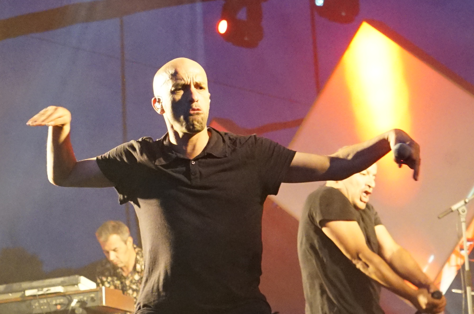 lors de Un été dans l'Aisne 2015 à Laon.